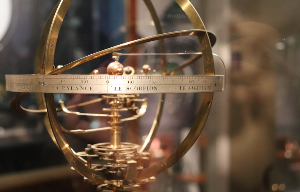 Gros plan sur une pendule à planétaire réalisée par Antide Janvier (vers 1773-1806) et conservée au musée Paul Dupuy (Toulouse) Lien